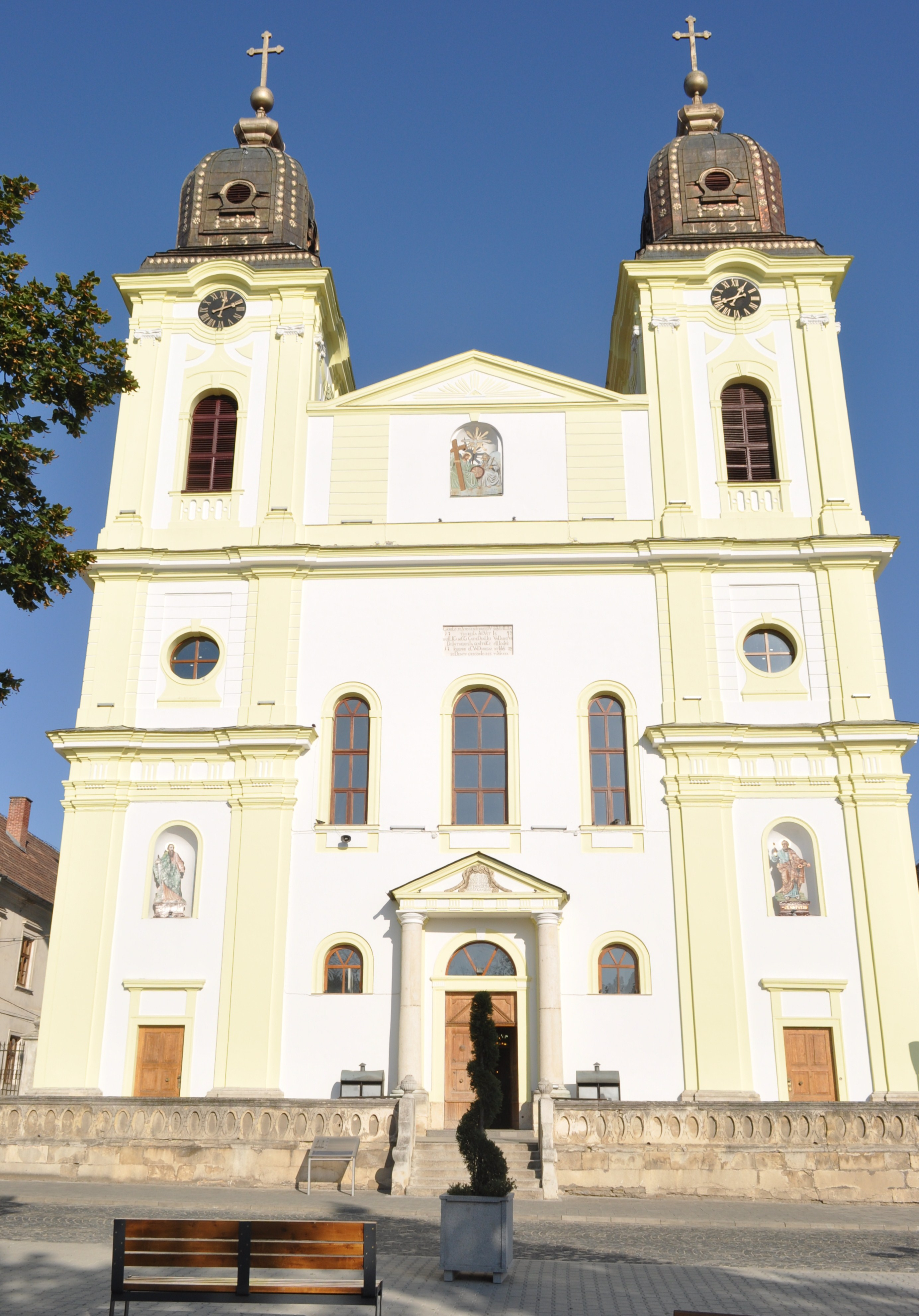 Catedrala Mitropolitană Greco-Catolică „Sfânta Treime” din Blaj